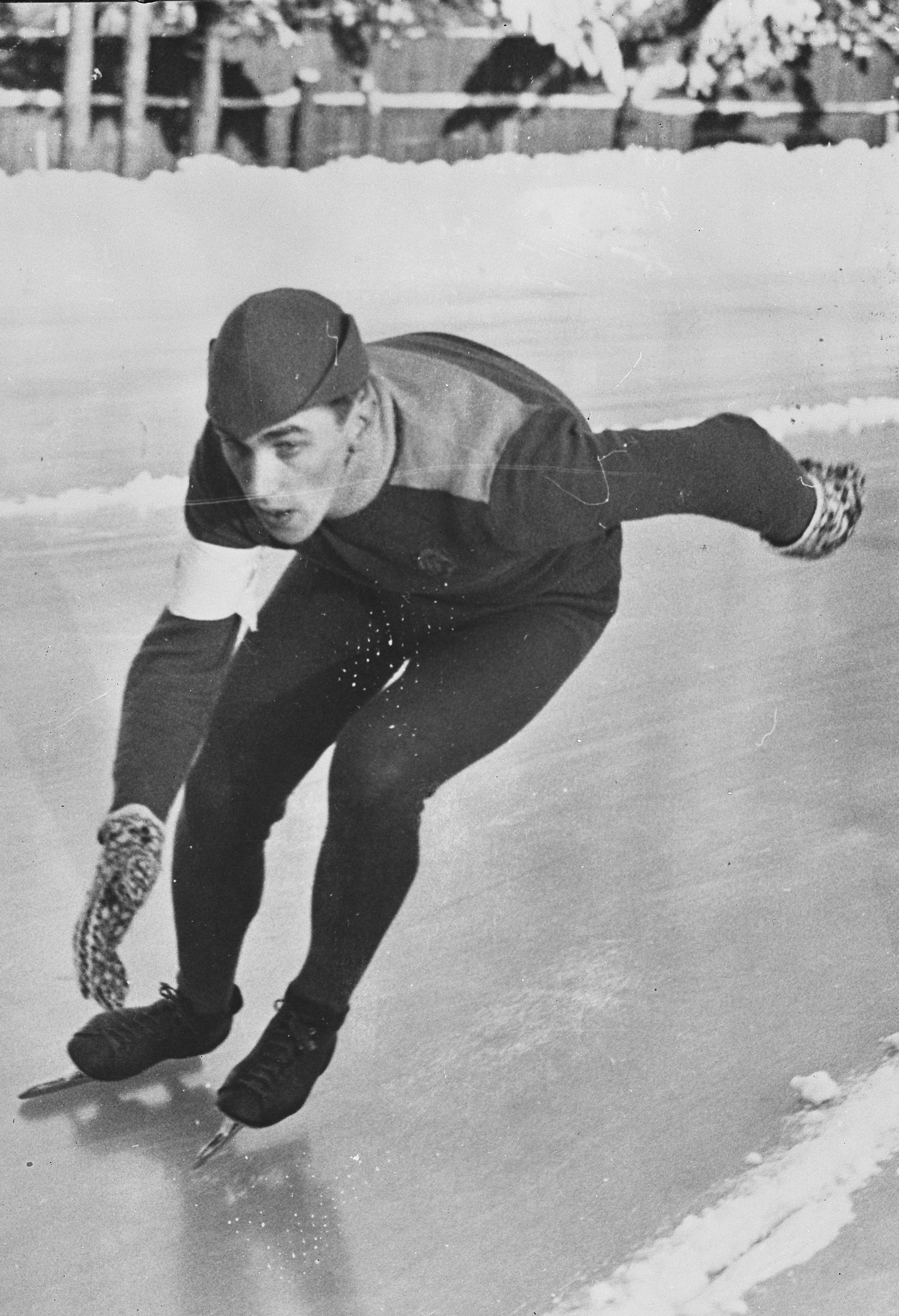 Collectie / Archief : Fotocollectie Anefo Reportage / Serie : [ onbekend ] Beschrijving : Sigge Eriksson kandiaat schaatskampioen (Zweden) Datum : 17 januari 1955 Locatie : Zweden Trefwoorden : Schaatskampioenen Fotograaf : Fotograaf Onbekend / Anefo Auteursrechthebbende : Nationaal Archief Materiaalsoort : Glasnegatief Nummer archiefinventaris : bekijk toegang 2.24.01.09 Bestanddeelnummer : 906-9456